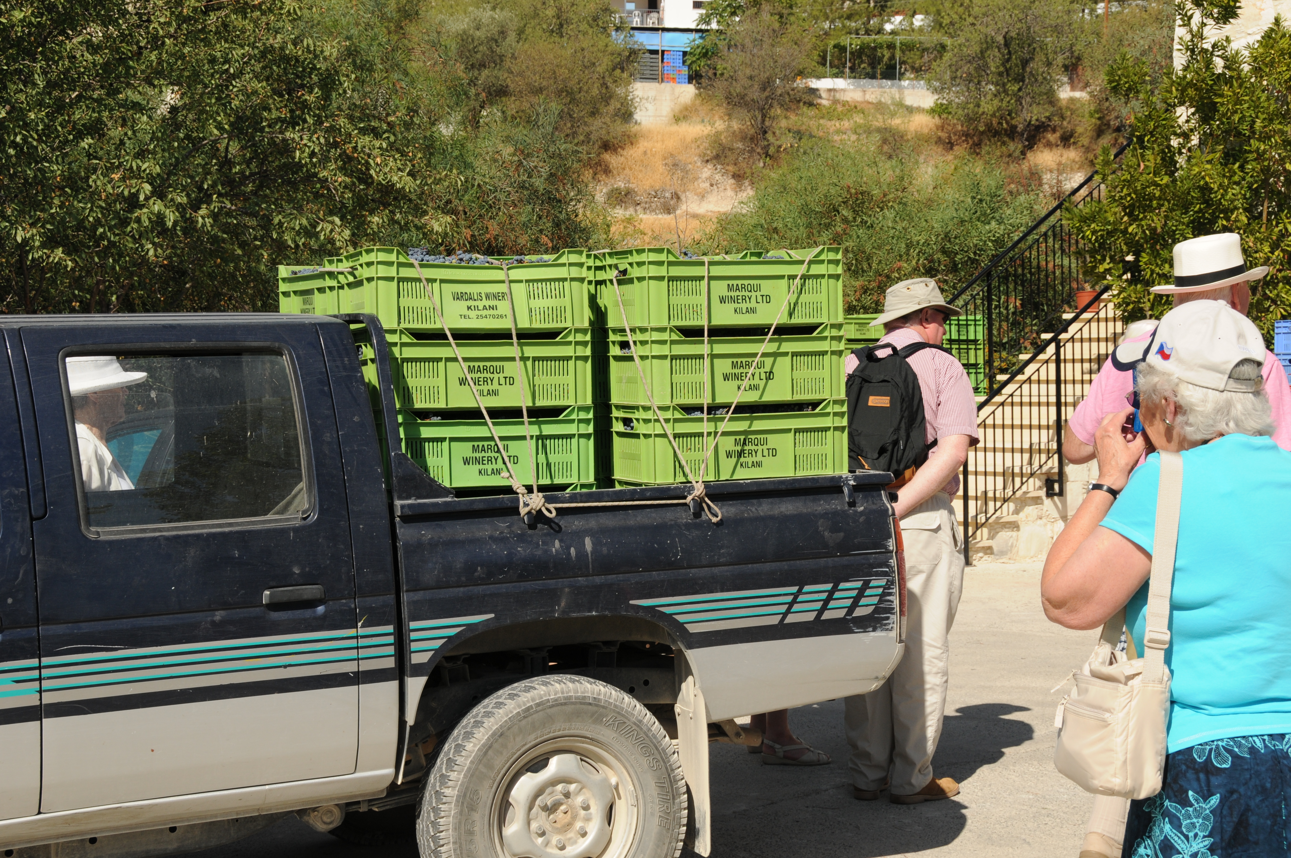 Arrivée de la vendange en petites caisses à la cave de Silikou